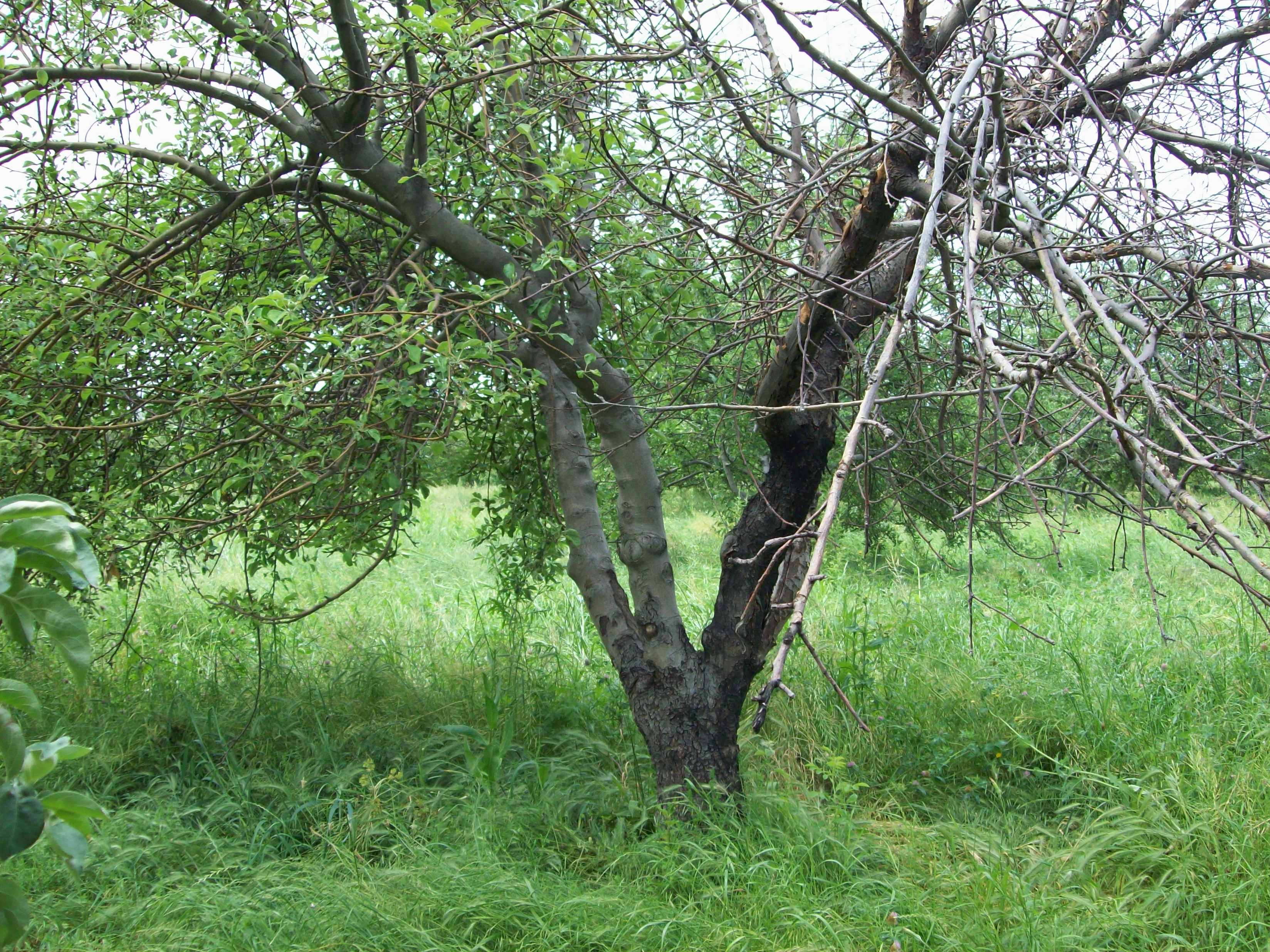 Черный рак - самый опасный болезнь усыхания яблони. За вегетацию яблоня полностью усыхает.